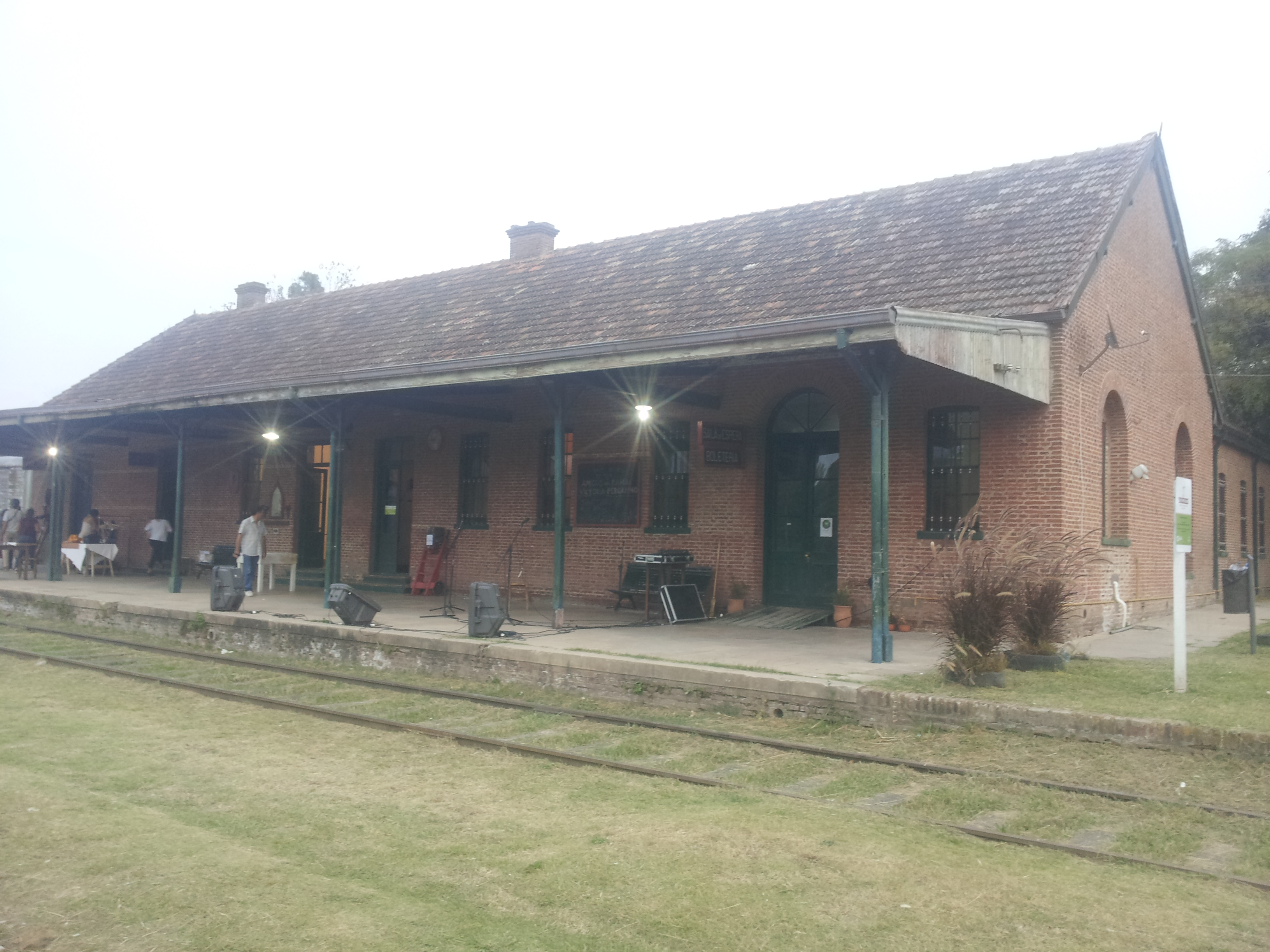 Estación Vagués, ubicada en el partido de San Antonio de Areco, Pcia. de Buenos Aires, República Argentina